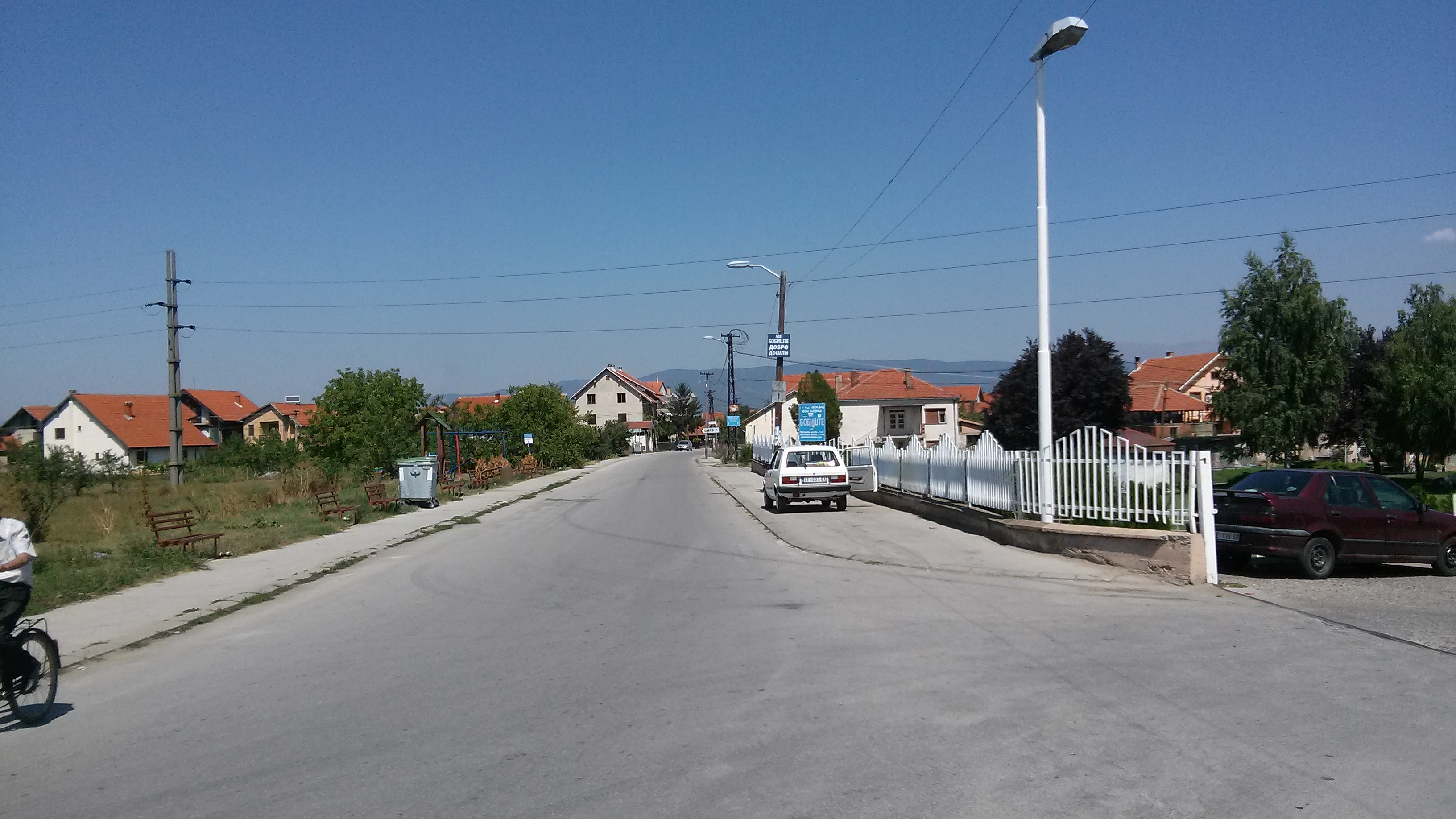 Ulaz u selo Bobište